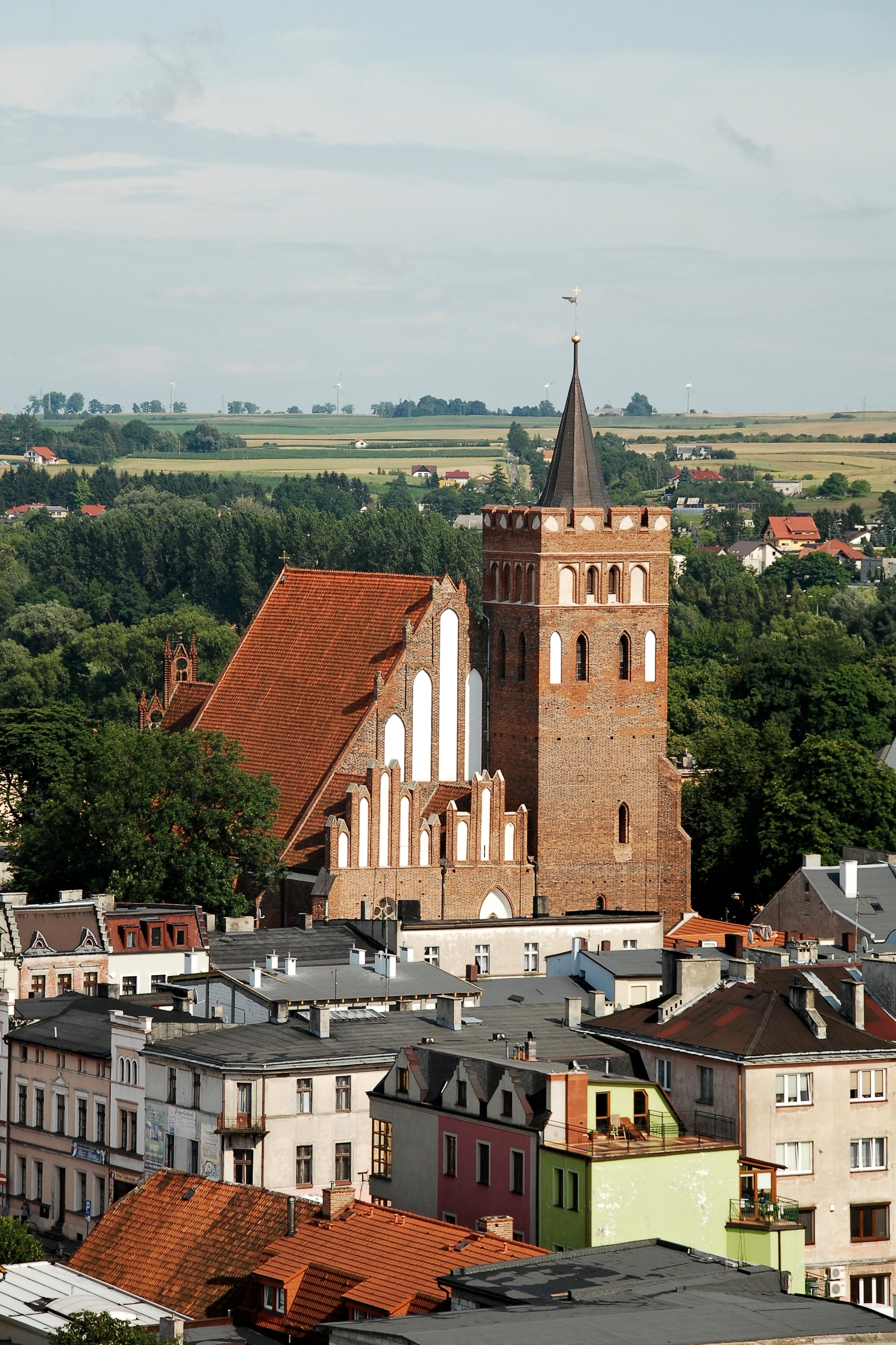 Kościół p.w. św. Katarzyny w Brodnicy - widok z wieży zamkowej..